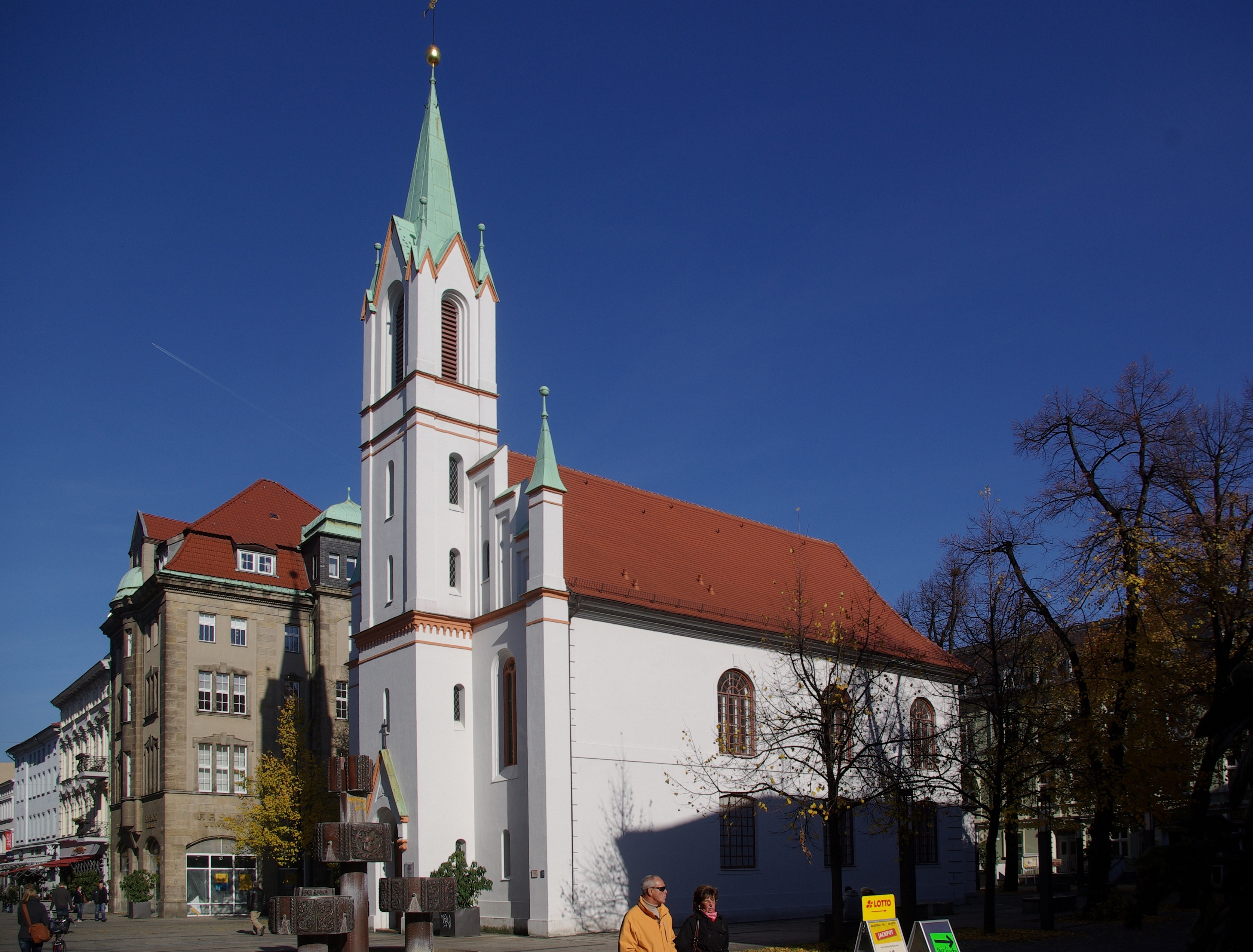 Cottbus in Brandenburg. Die Schlosskirche in der Spremberstraße steht unter Denkmalschutz.